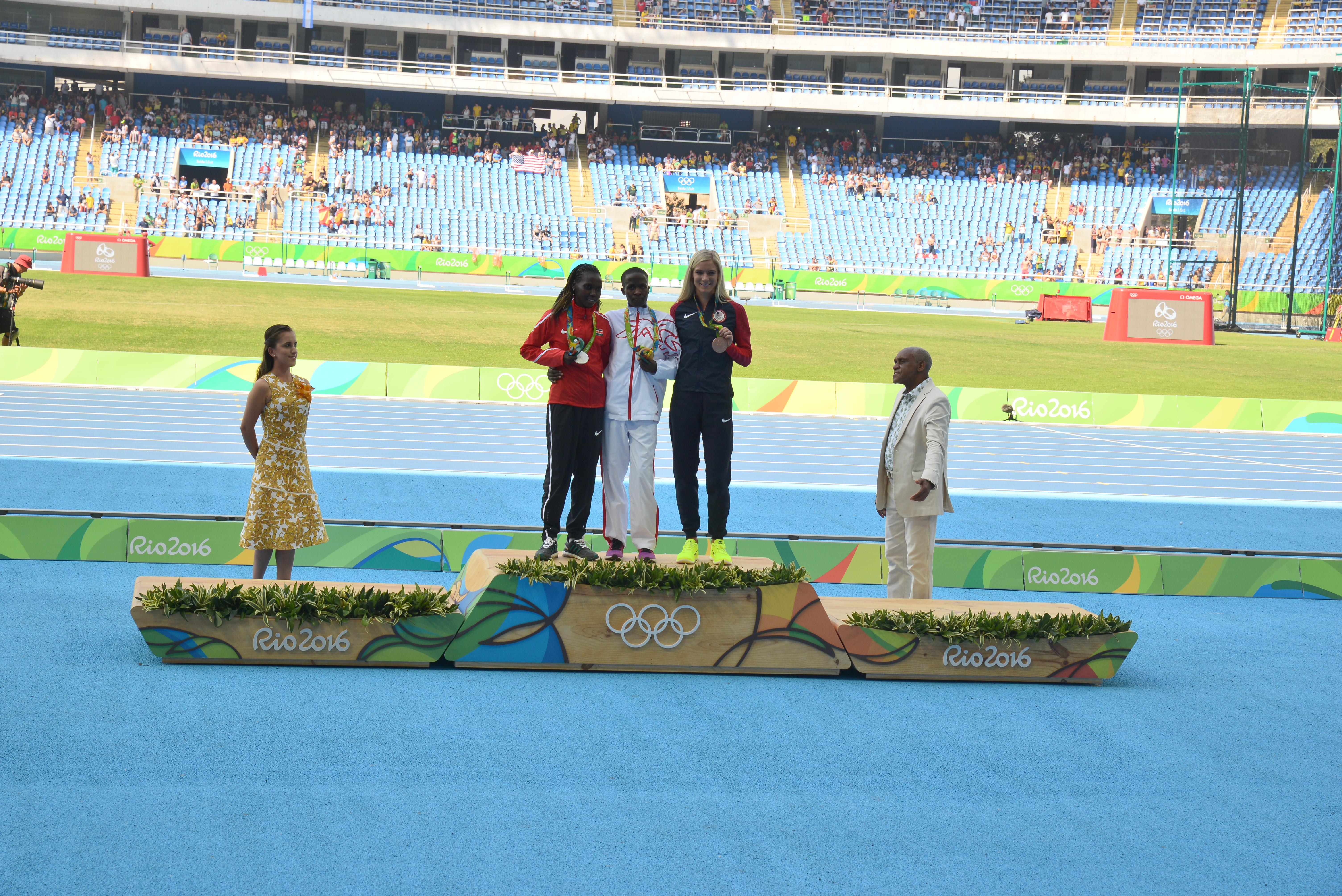 Podium du 3000m steeple féminin des JO de Rio 2016